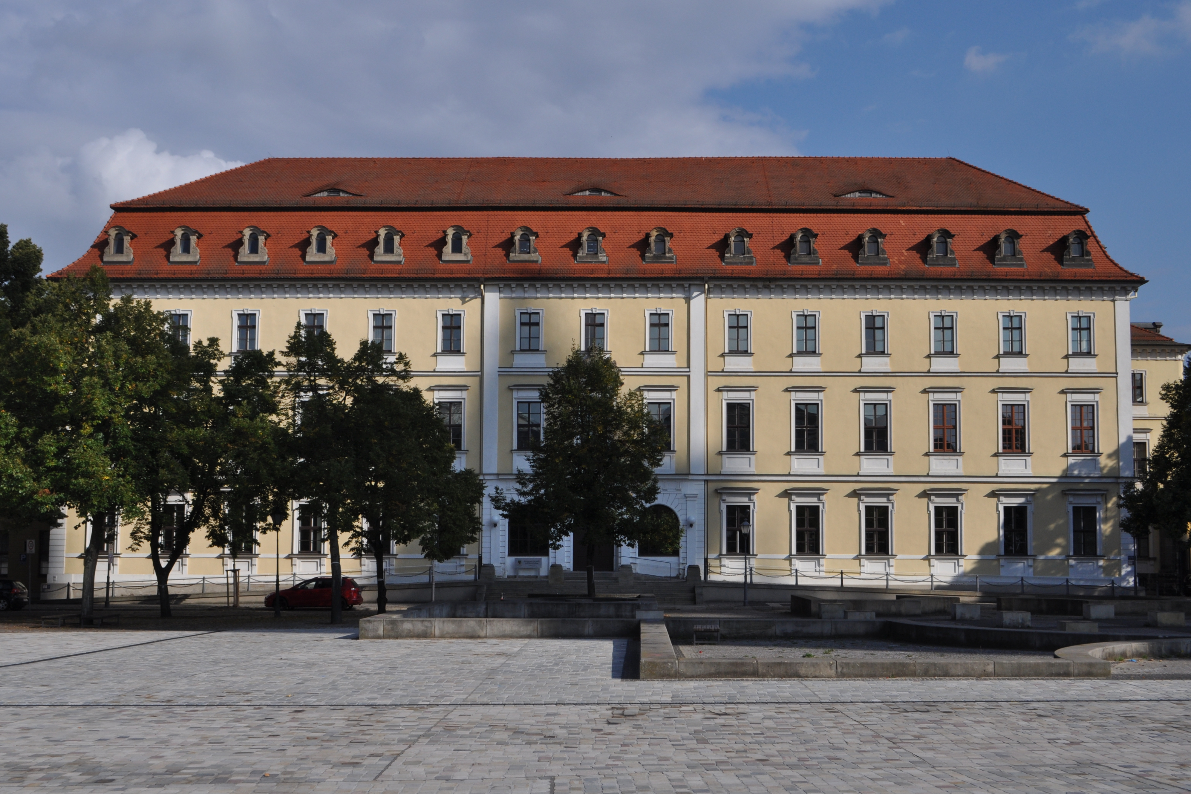 Ehemaliger erzbischöflischer Palast , Domplatz 2, 3, in Magdeburg-Altstadt. This is a photograph of an architectural monument.It is on the list of cultural monuments of Magdeburg